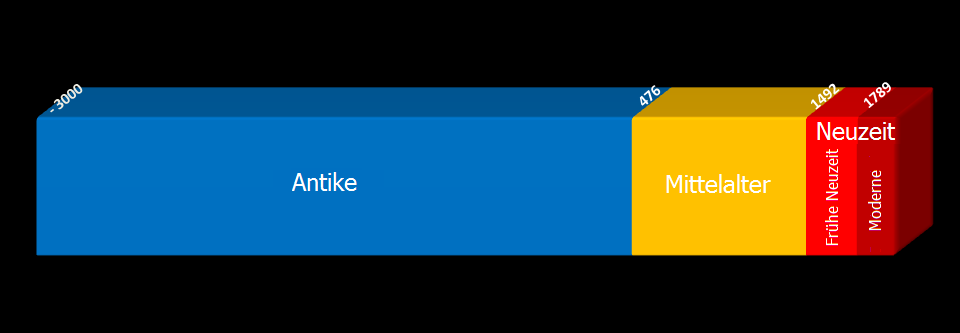 Klassische europäische Periodisierung der Weltgeschichte